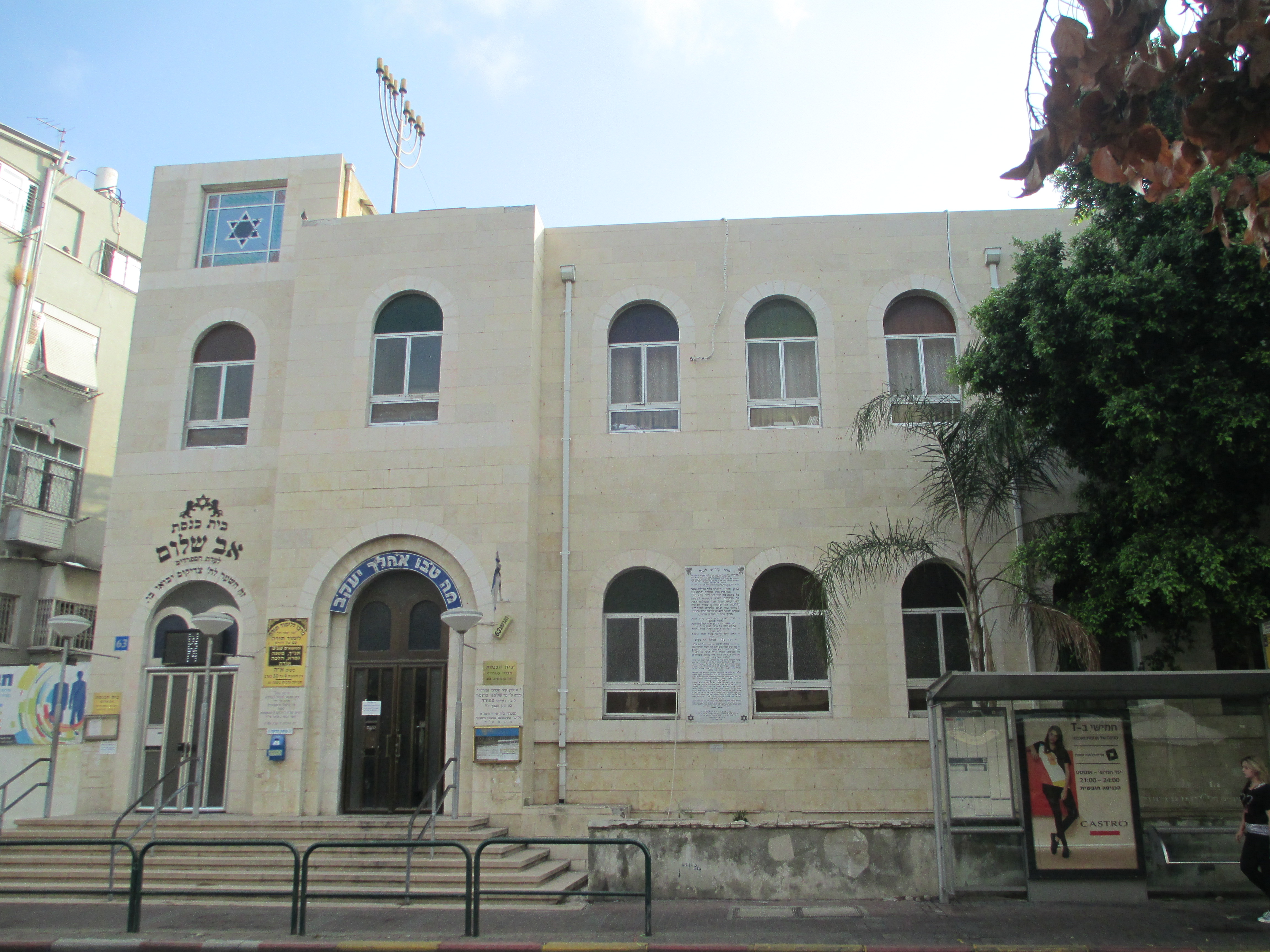 בית הכנסת של שכונת נורדיה (לשעבר) ברח' בוגרשוב 63 בתל אביב